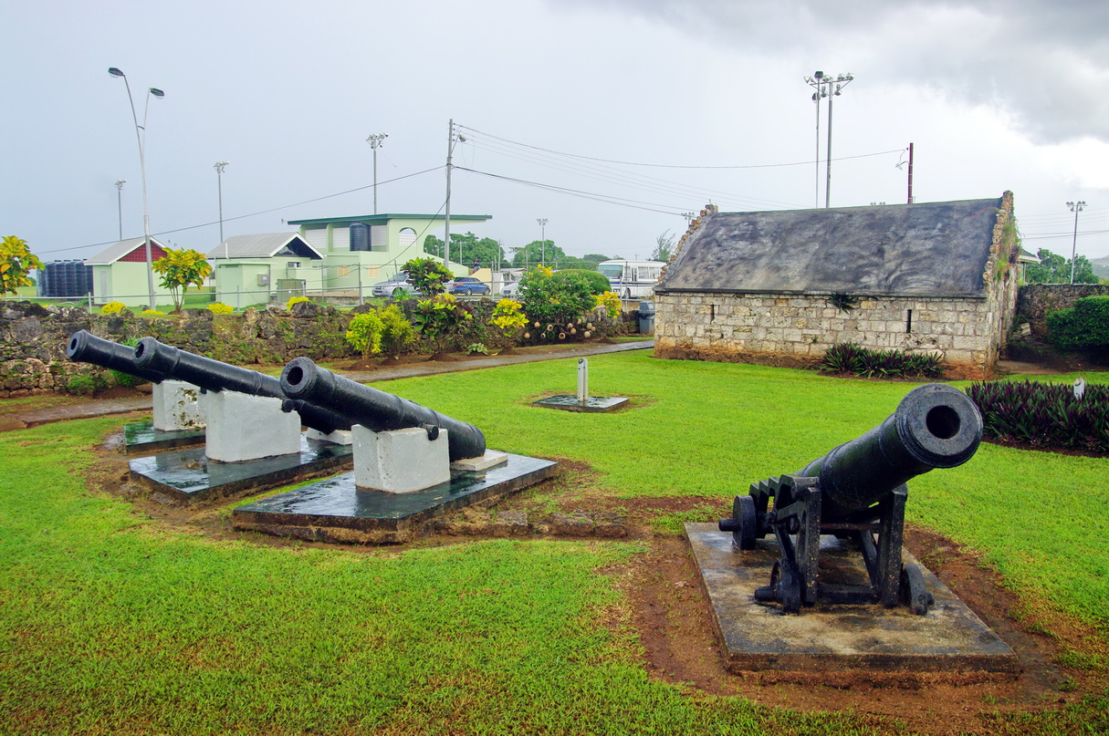 Kanonen am Fort James, Plymouth, Tobago